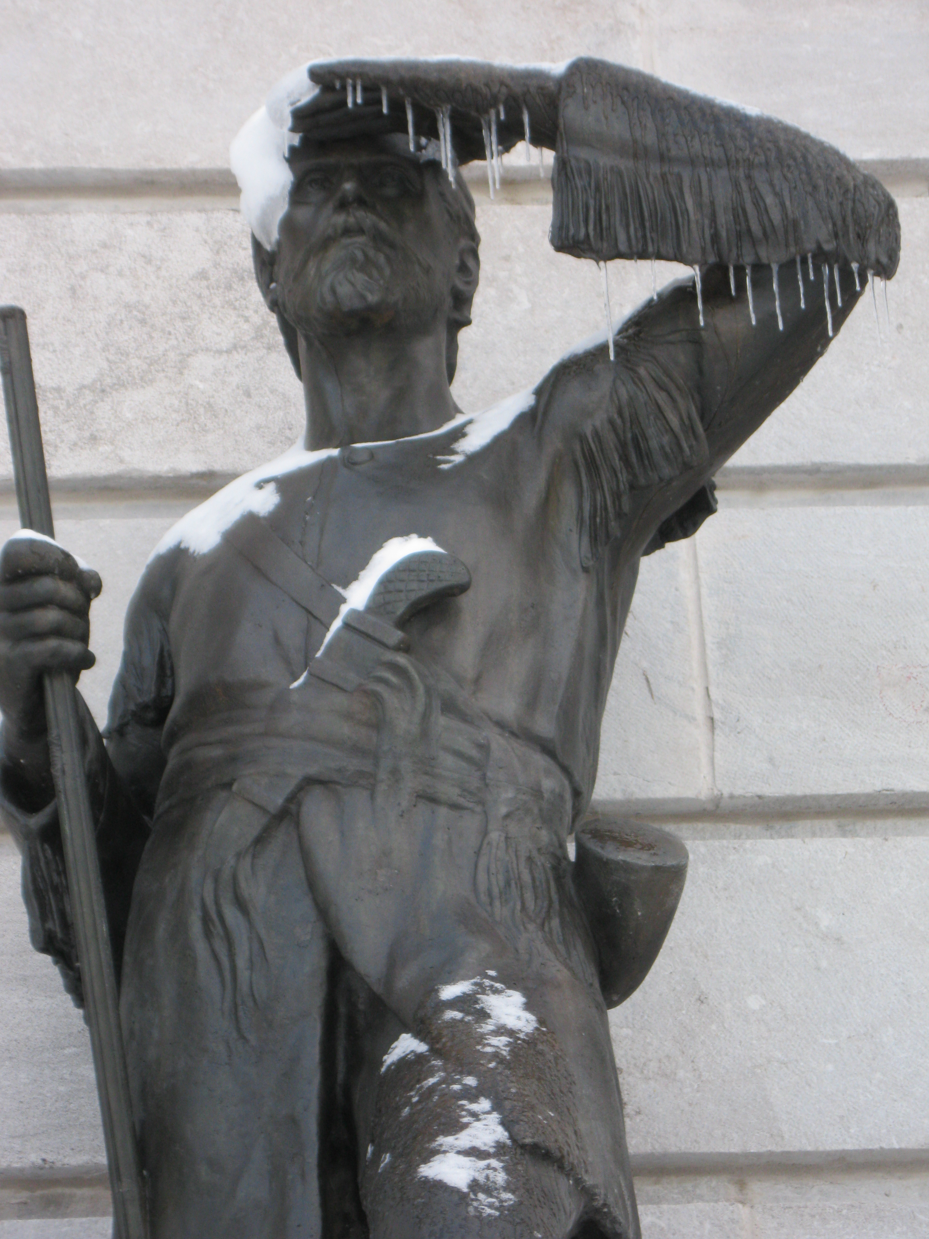 Pierre Gaultier de Varennes et de la Vérendrye (1685-1749), sculpture devant l'hôtel du Parlement de Québec, aile droite, série des découvreurs